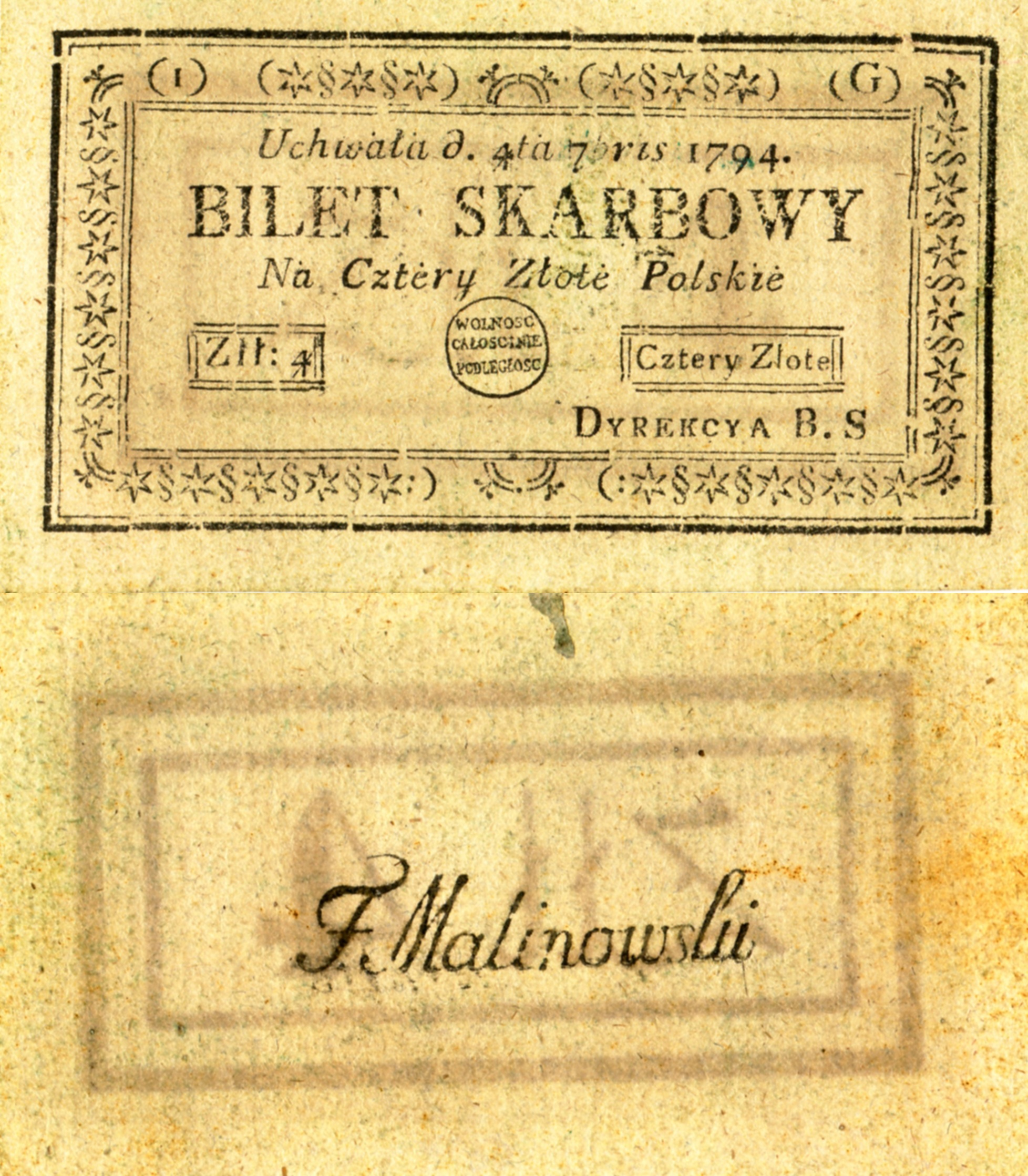 Bilet skarbowy z 1794 r., drukowany w Warszawie i emitowany podczas insurekcji kościuszkowskiej, wartości 4 złotych polskich. W czasie trwania powstania kościuszkowskiego był to pełnoprawny środok płatniczy na terenie Rzeczypospolitej.